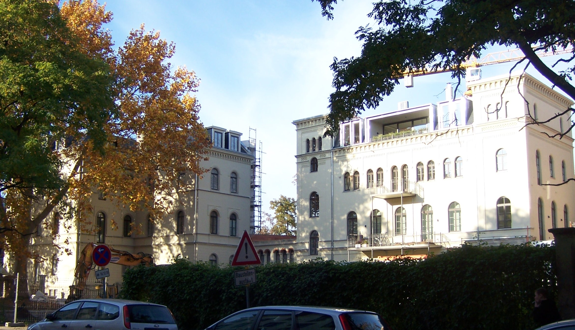 Goldschmidtstraße, ehemals Königstraße 33. Rechts zu sehen das noch erhaltene ehemalige Papierlager des Verlages Ernst Keil, der die erste Illustrierte Deutschlands, die "Gartenlaube" herausbrachte. Links davon das ehemalige Nebenhaus der Villa Keil, das mit seiner Front zur Talstraße (Talstraße 7) steht. Die ehemalige Villa des Verlegers selbst, die man sich als vor dem Gebäude, also wo jetzt Parkplatz und Fußweg zum Haus sich befinden, stehend vorstellen muss, wurde im Zweiten Weltkrieg vollständig zerstört. Heute wird sowohl dieses als auch das links neben diesem stehende ehemalige Nebenhaus der Villa Keil als Wohnhaus genutzt (pro Etage jeweils eine Wohnung).